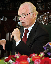 Валерий Николаевич Ганичев Председатель правления Союза писателей России сопредседатель комиссии Всероссийской историко-литературной премии "Александр Невский" на пресс-конференции, посвященной объявлению лауреатов премии